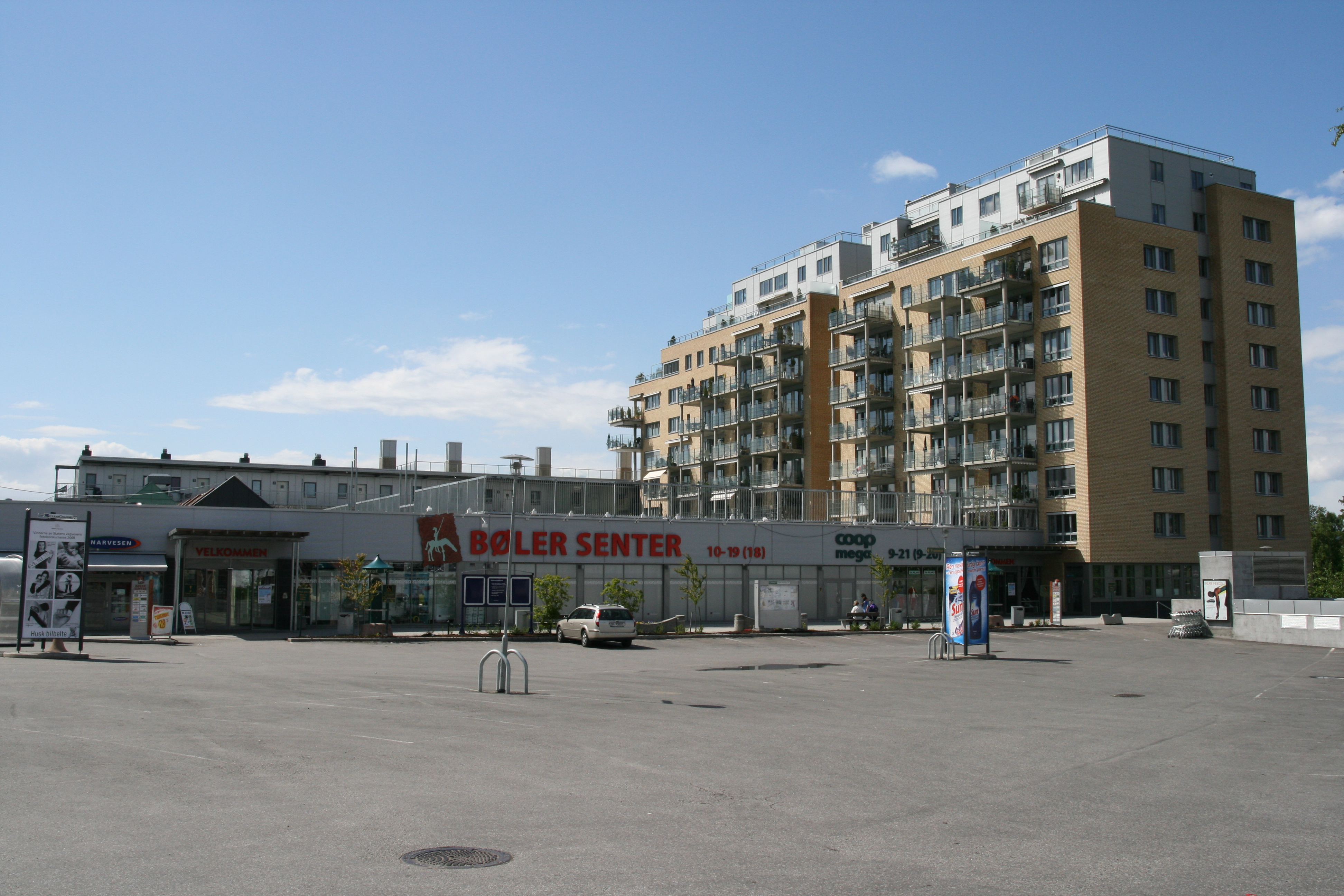 Bøler senter, Oslo